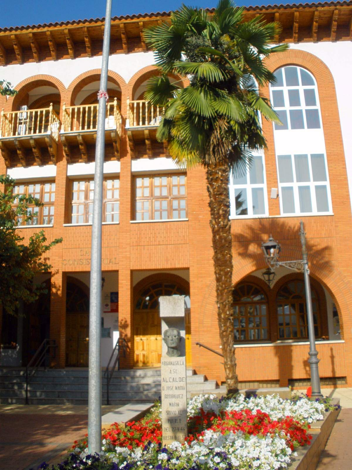 Ayuntamiento de Argamasilla de Calatrava (Ciudad Real)